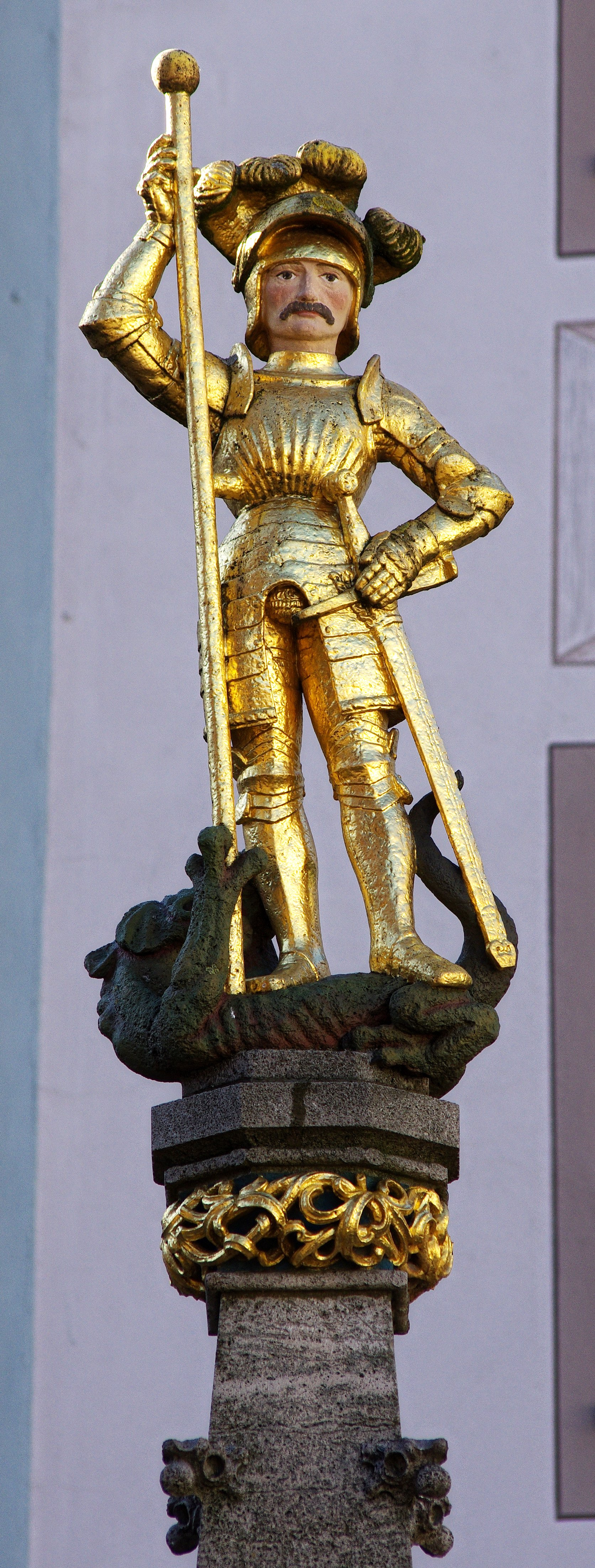 St.-Georgs-Brunnen von Carl Anton Meckel auf dem Freiburger Münsterplatz